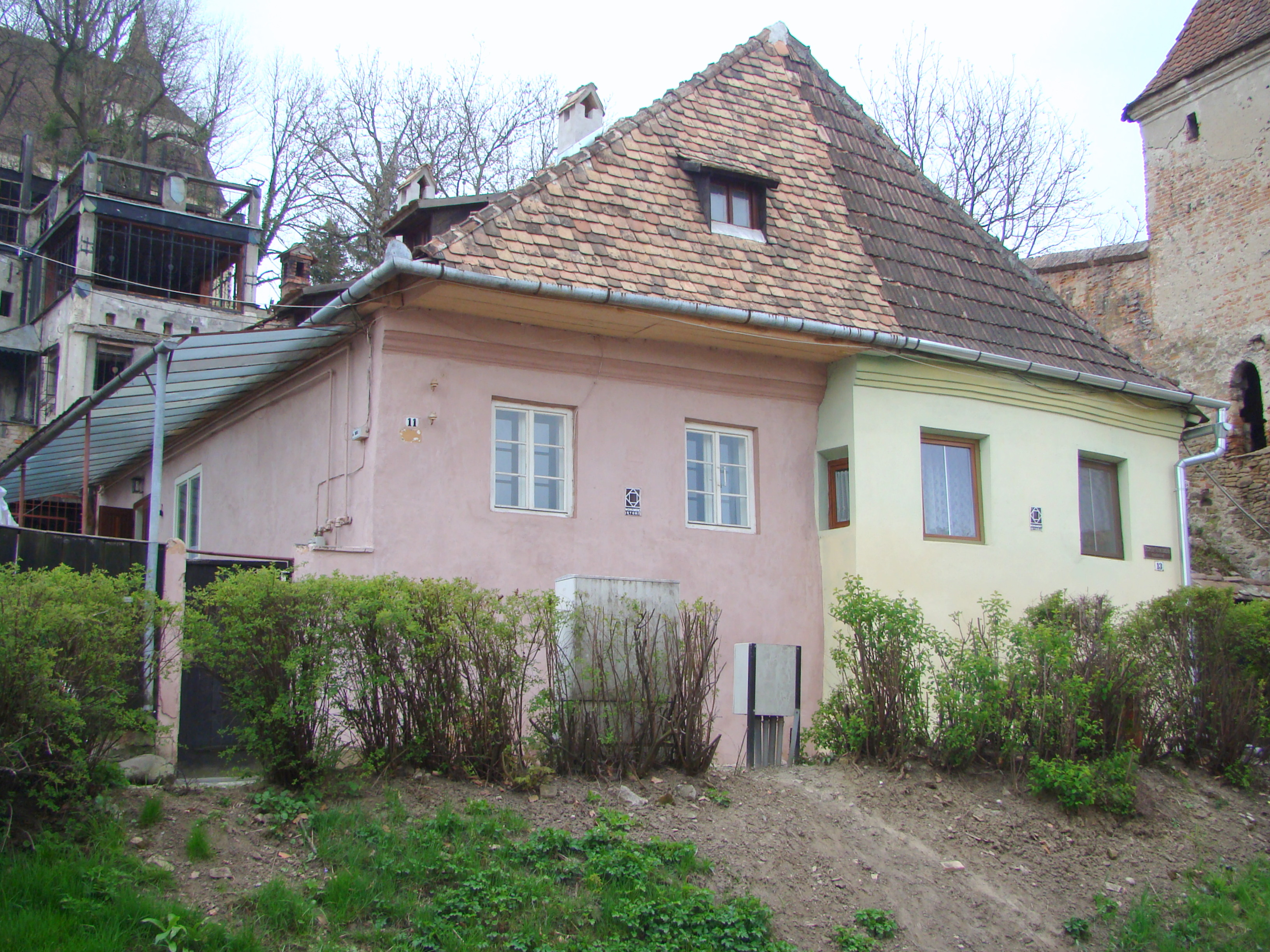 Casa Durutya-Ebner, municipiul Sighișoara, str. Cojocarilor 11-13 sec. XVII - XVIII